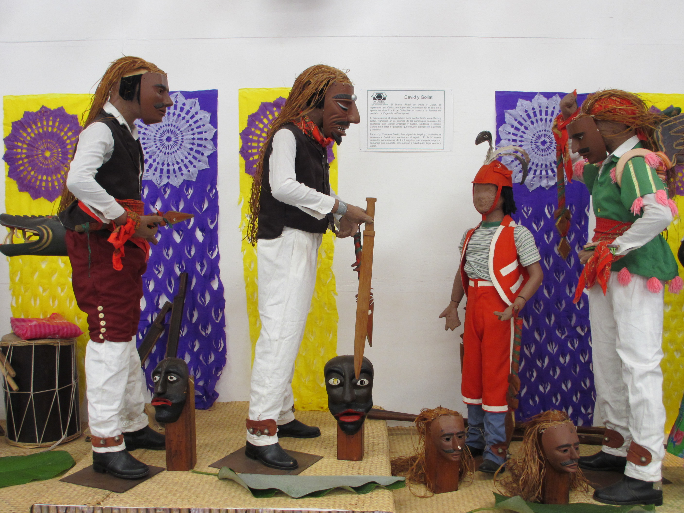 Indumentaria utilizada por los participantes en la danza de "David y Goliat", que se baila principalmente en el poblado de Cúlico, municipio de Cunduacán. Una de las danzas más importantes y autóctonas del estado de Tabasco, México.